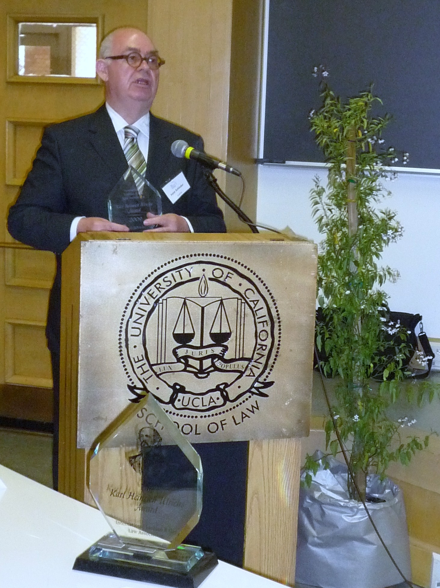 Peter Schieder nach der Überreichung des Karl Heinrich Ulrichs Award der International Lesbian, Gay, Bisexual, Transgender & Intersex Law Association bei der Konferenz in Los Angeles